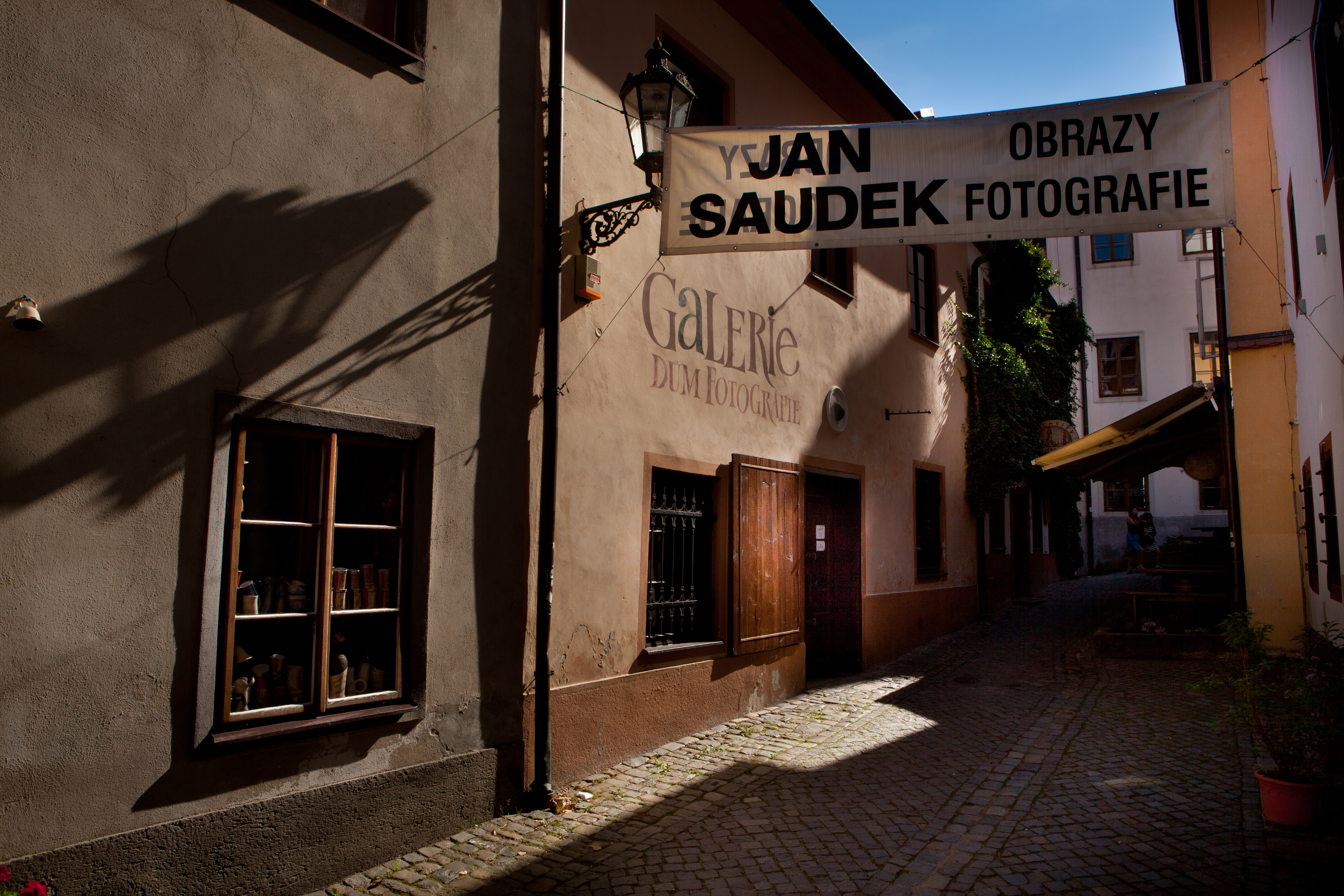 Jan_Saudek - Dum_Fotografie. Dům fotografie, Muzeum, Šatlavská 141, 381 01 Český Krumlov.